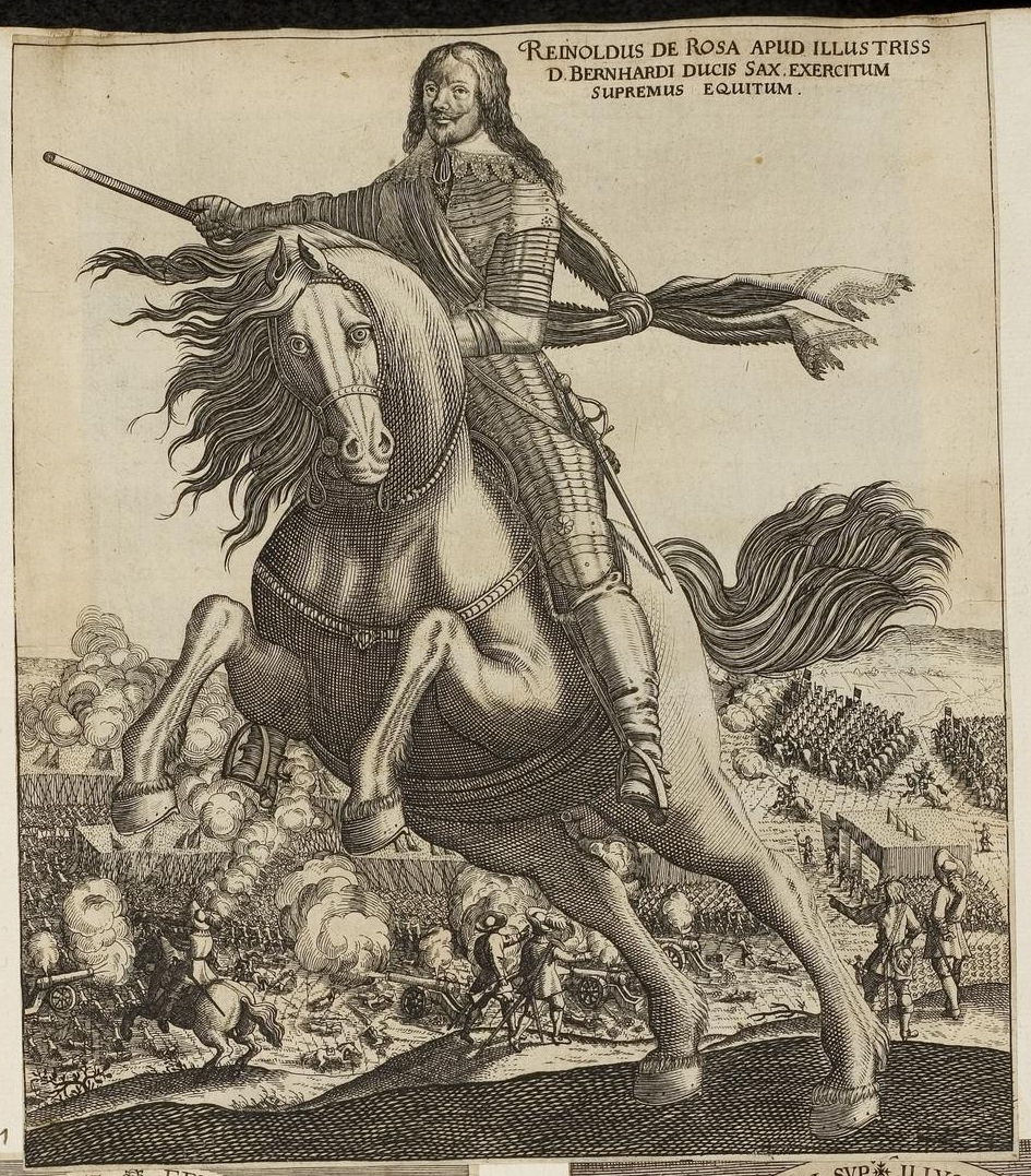 Grafik aus dem Klebeband Nr. 1 der Fürstlich Waldeckschen Hofbibliothek Arolsen Motiv: Reinhold von Rosen (1605–1667), Schwed. Generalleutnant